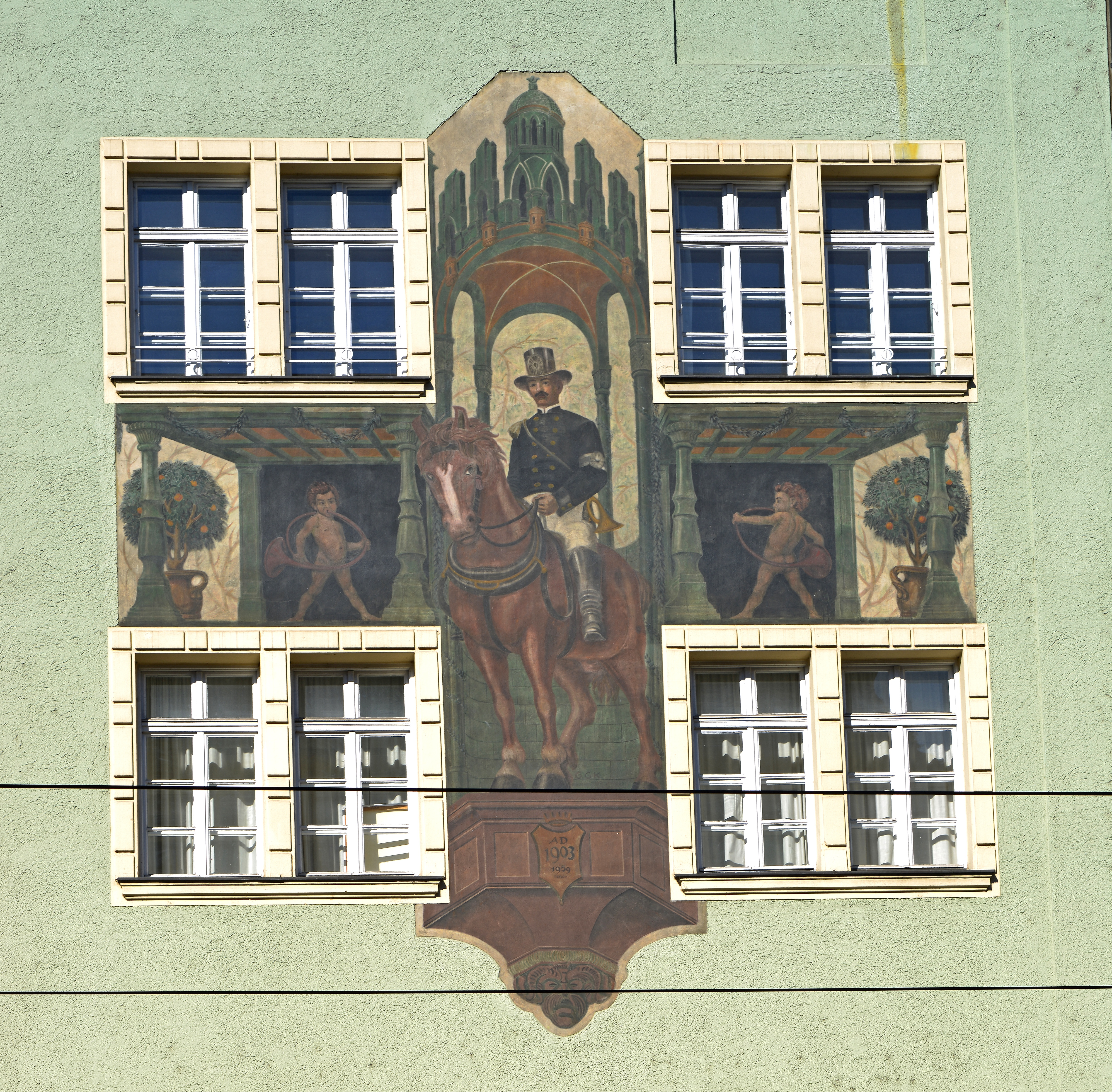 Münche, Zweibrückenstraße 8. Fassadenmalerei gezeichnet von Gottfried Gottlieb Klemm um das Jahr 1905. Renoviert 1956, und abermals renoviert in den neuzehnhundertachziger Jahren. Die beiden schwarzen Linien vor dem Bild zeigen die Oberleitung der Trambahn.